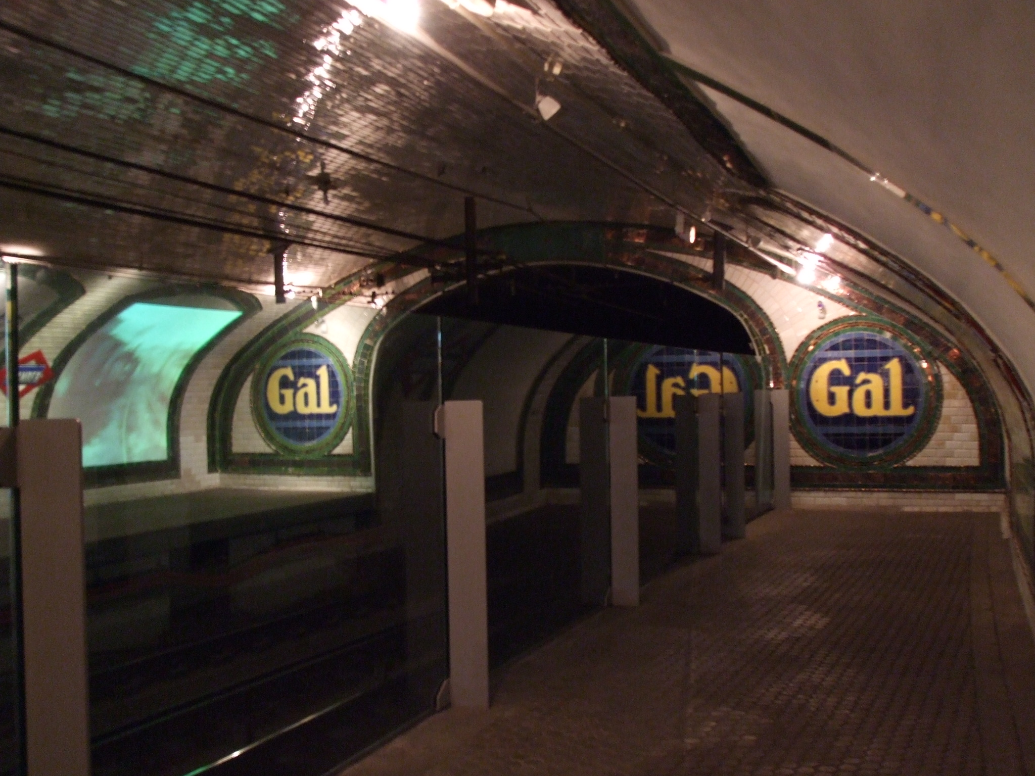 Estación de Chamberí Tunel dirección Bilbao